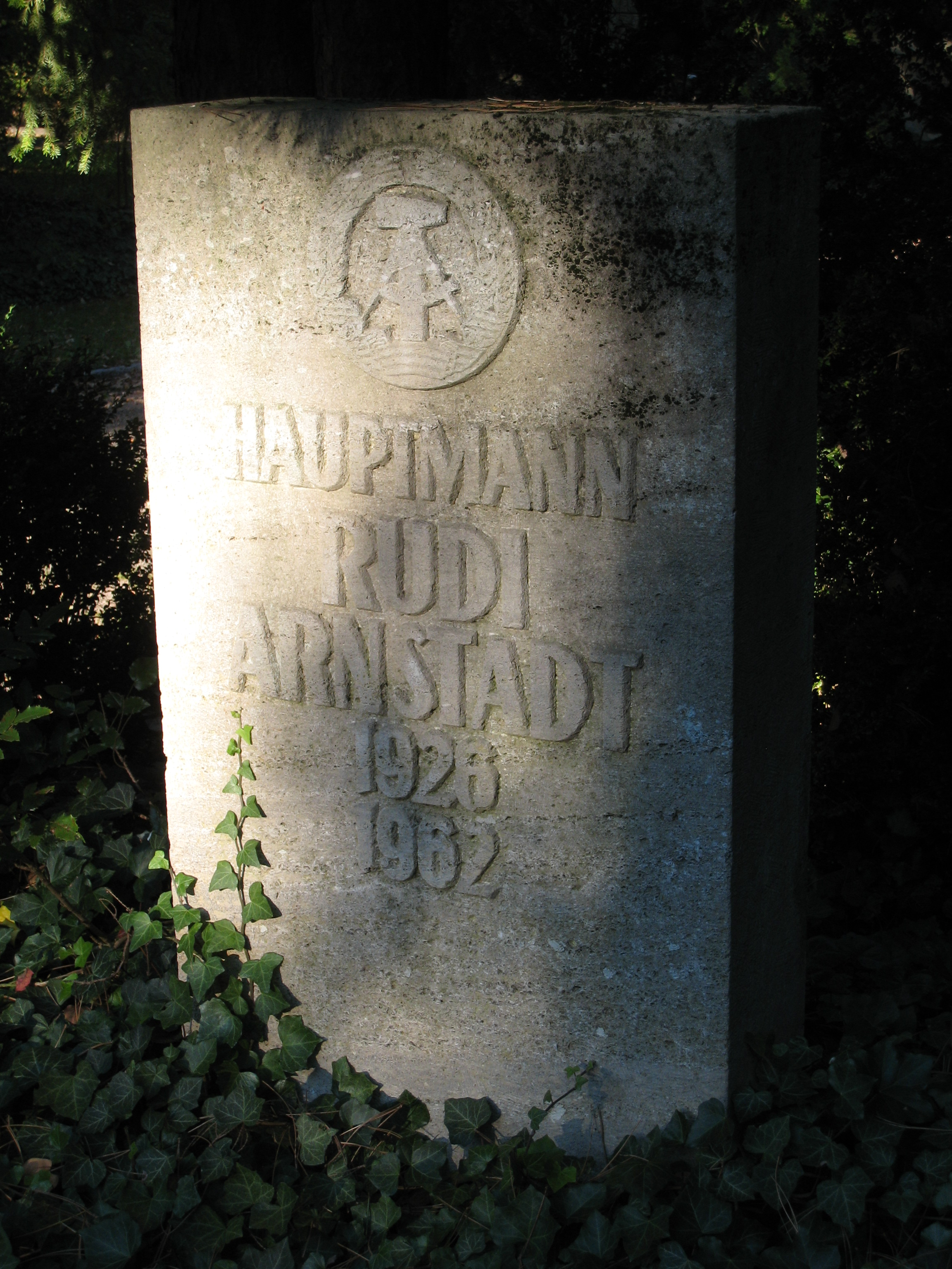 Ehrengrab des DDR-Grenzsoldaten Rudi Arnstadt am Erfurter Hauptfriedhof